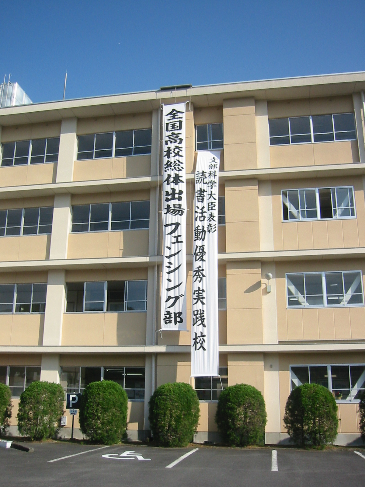 Ibi Senior Highschool(岐阜県立揖斐高等学校),Ibigawa,Gifu,Japan(岐阜県揖斐川町)で撮影